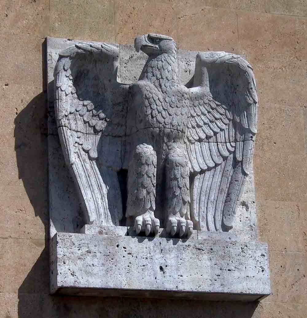 NS-Adler (ohne Hakenkreuz) 2007 am Flughafengebäude Berlin-Tempelhof